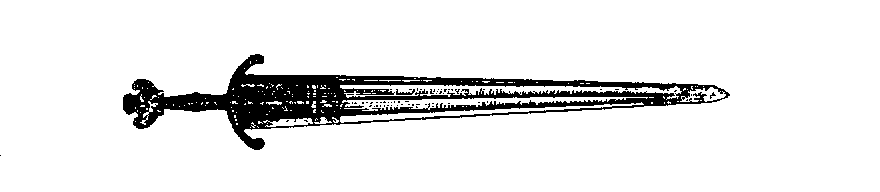 рис.227 Итальянский меч XIV века,музей Клюни.